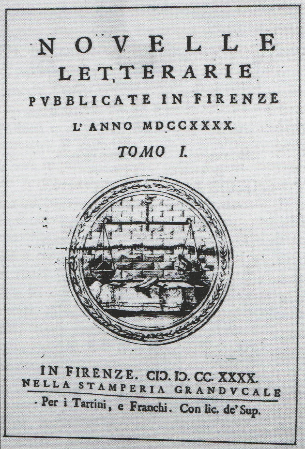 Frontespizio delle «Novelle letterarie», giornale fondato a Firenze nel 1740.